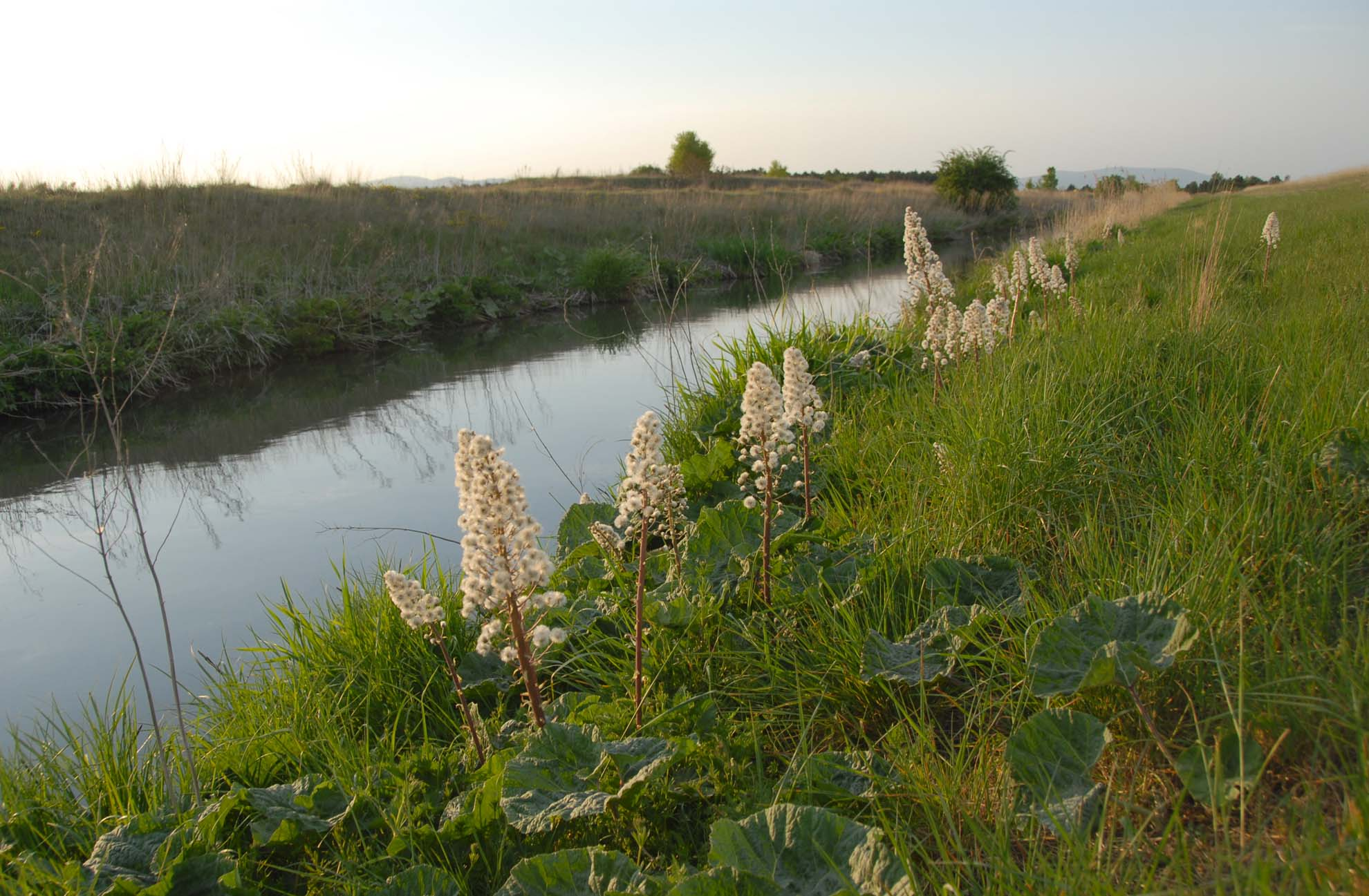 Pestwurz am Kanal bei Groß Mittel